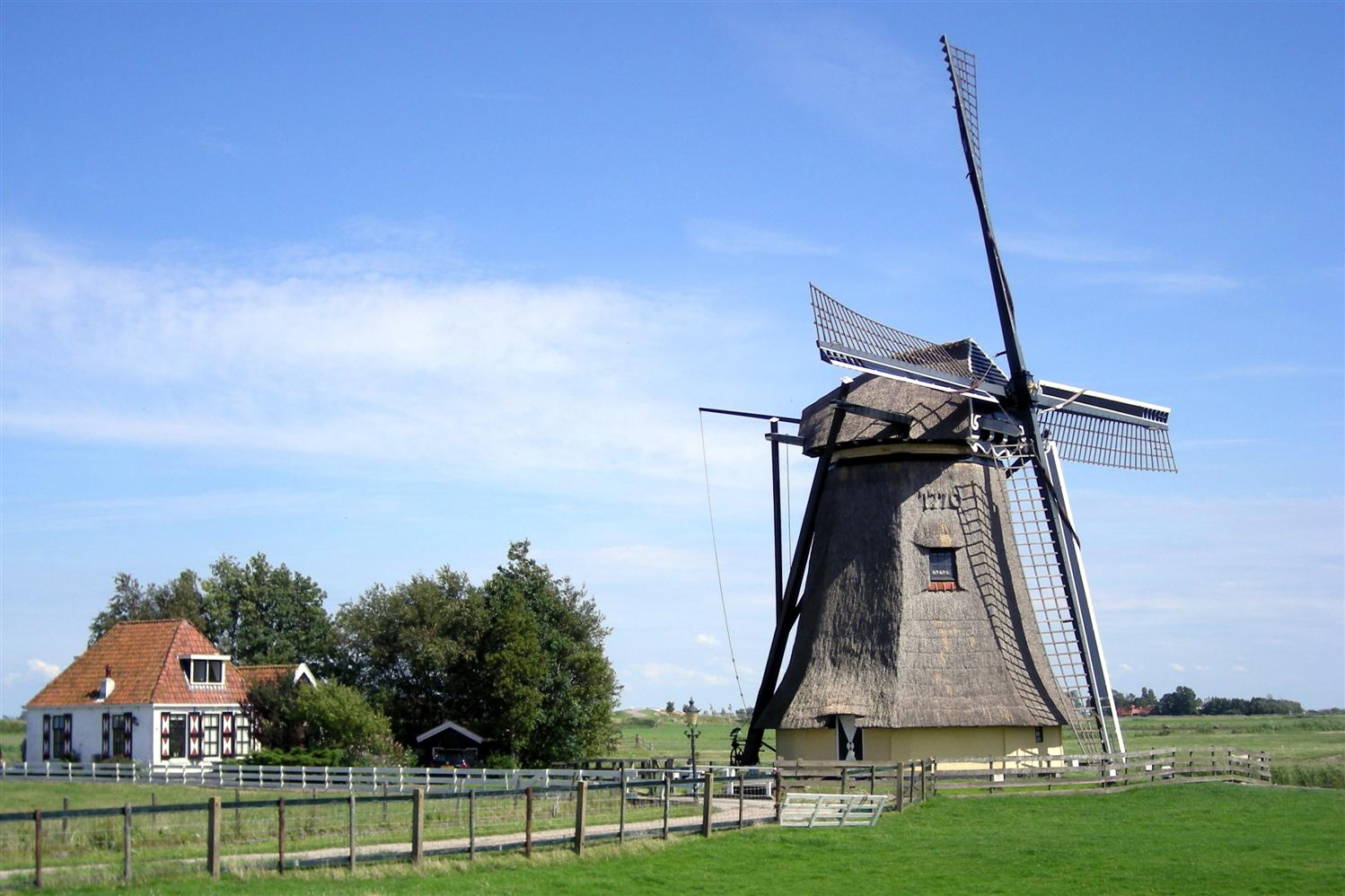 De Nijlannermolen in Workum